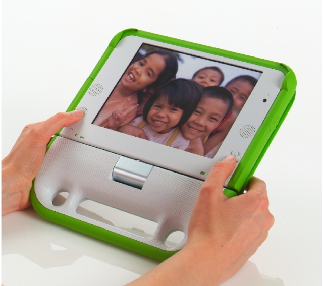 100 dollar laptop: ebook mode